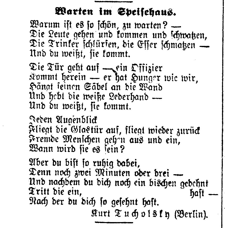 Warten im Speisehaus, in: Prager Tagblatt, 4. April 1912, Jahrgang 37, Nummer 93, Seite 6